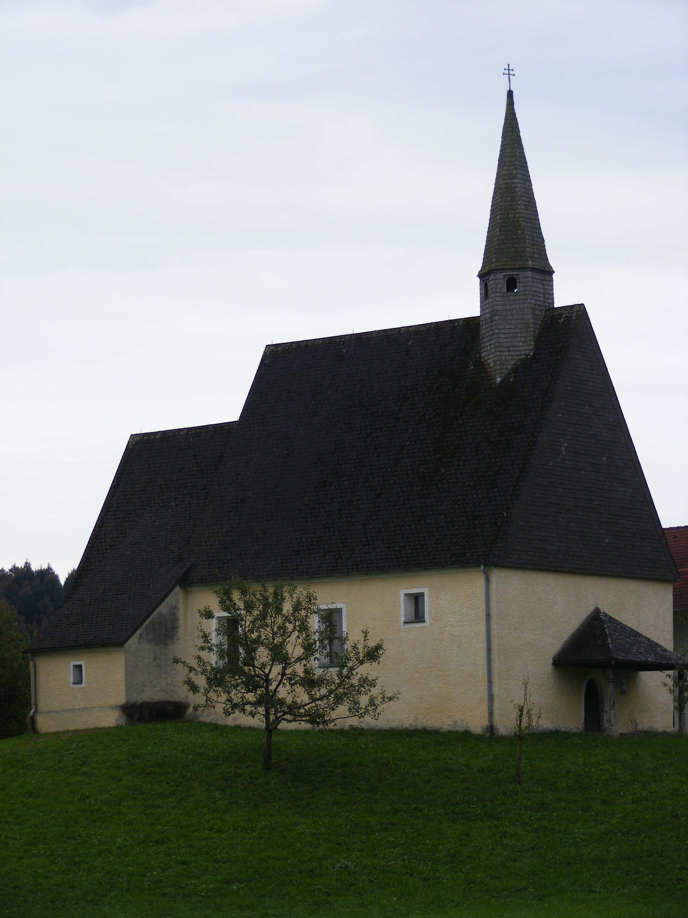 Kath. Filialkirche hl. Alban